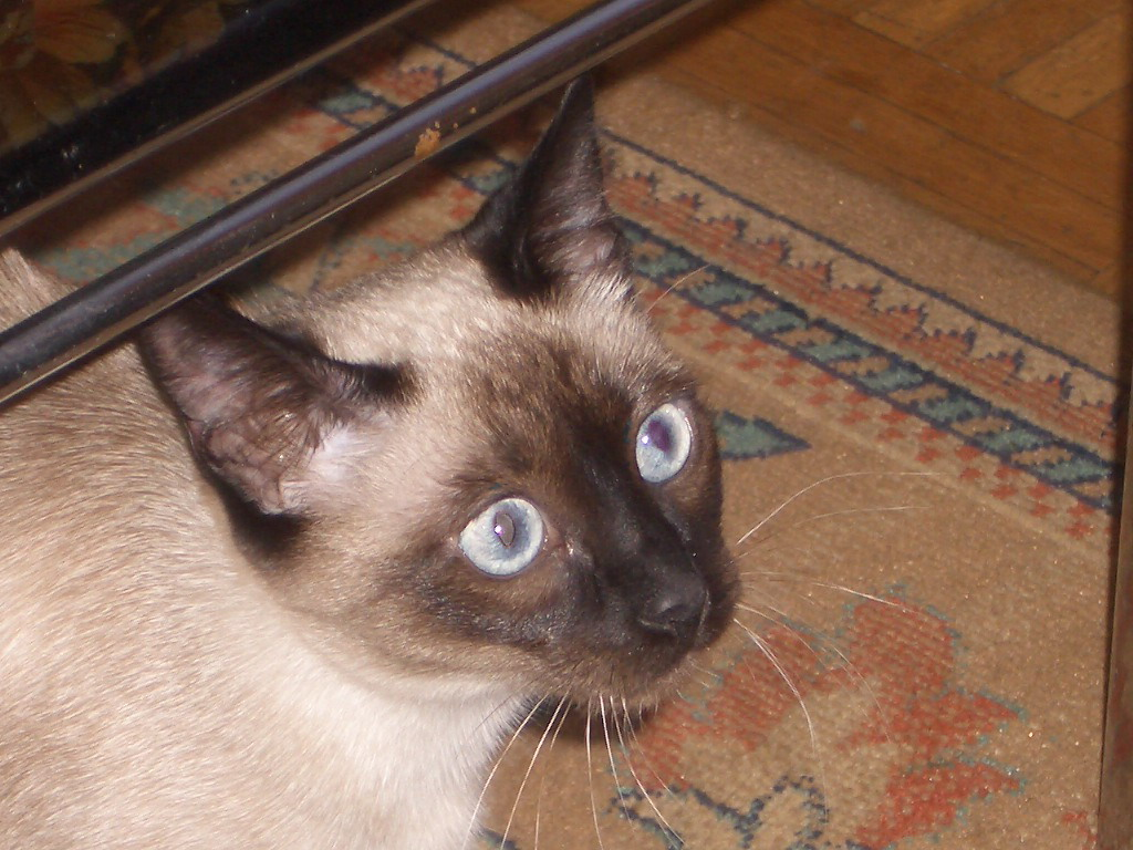 Nucki a siamese cat